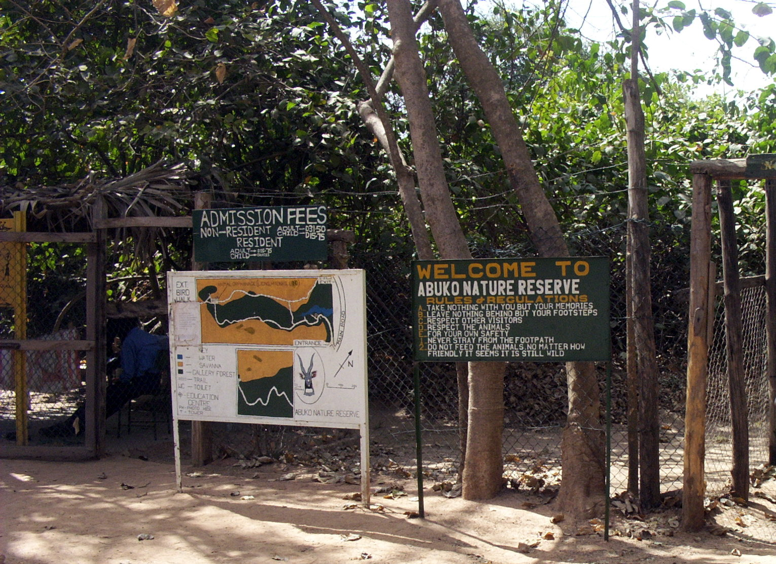 Abuko Nature Reserve, Gambia